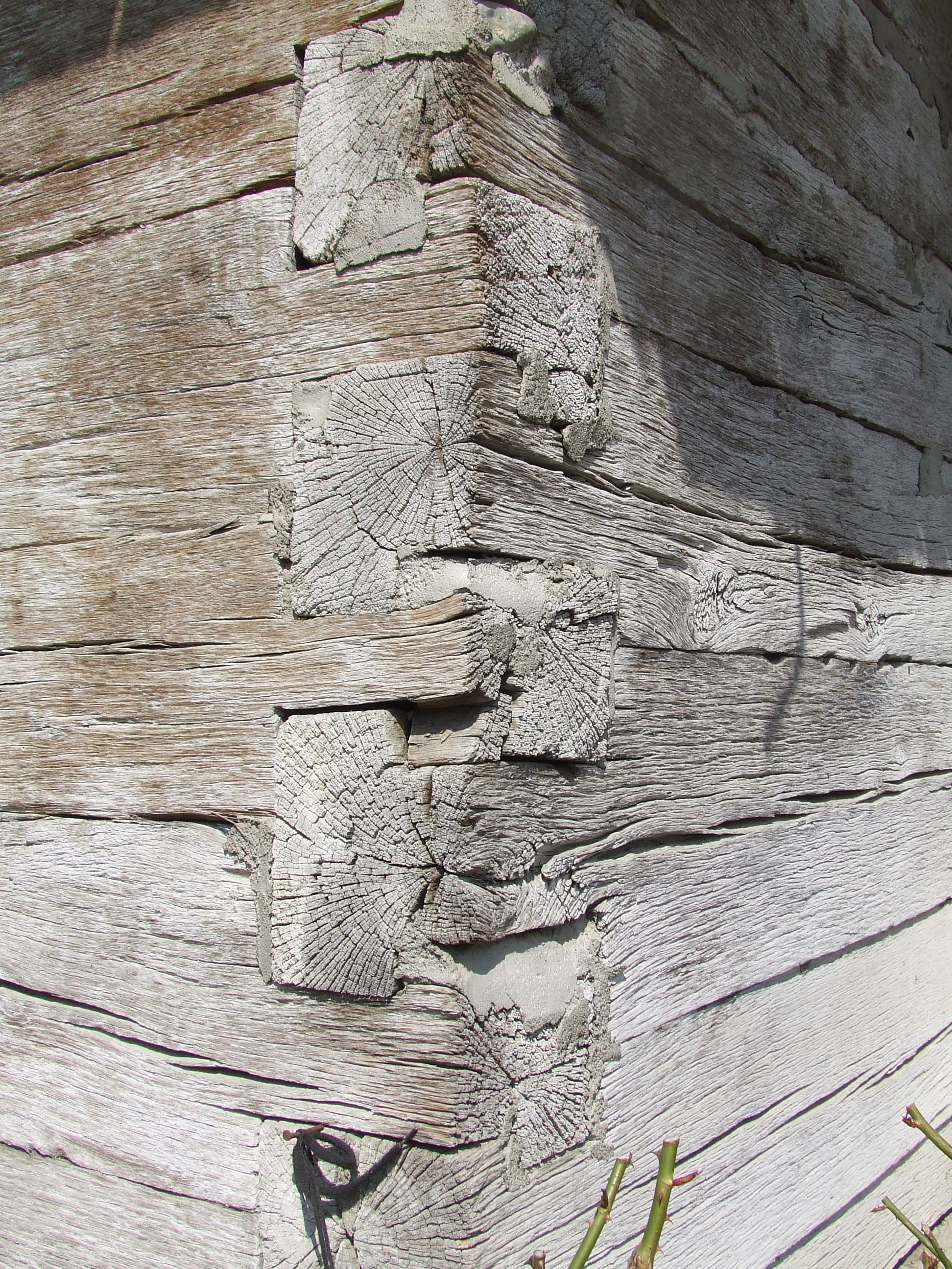 Îmbinare, Biserica de lemn Sf Arhangheli din Letca, jud. Sălaj